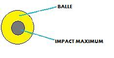 visualisation de l'impact d'une balle de tennis: comparaison entre le diamètre de la balle et celui de l'impact théorique maximum